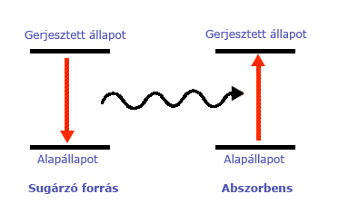 Mössbauer-elmélet szemlélető ábrája